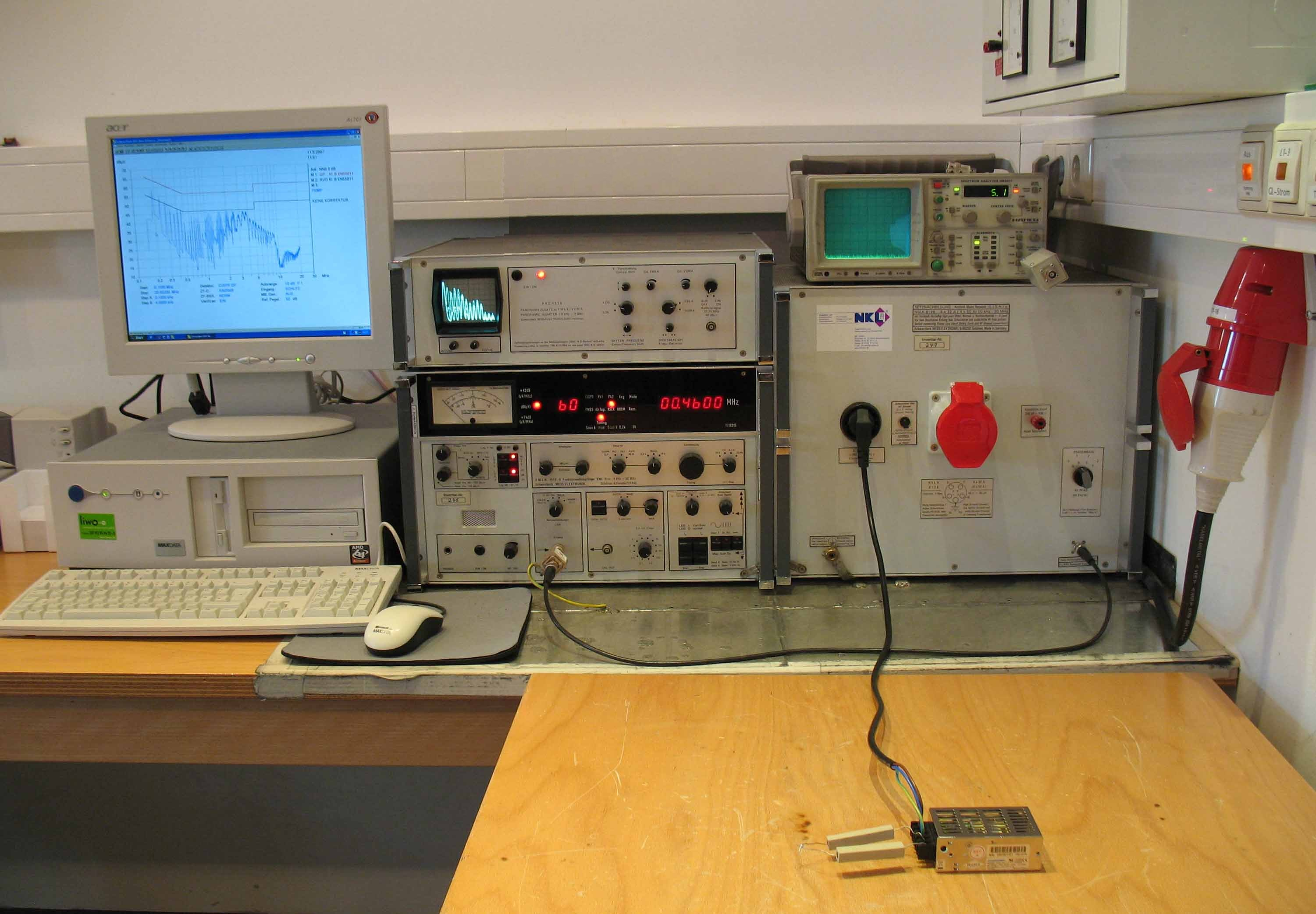 Funkstörspannungsmessung im EMV-Labor der NKL GmbH